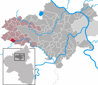 Ditscheid in Rhineland-Palatinate - district Mayen-Koblenz